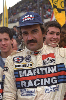 Jorge Del Buono (izq.) y Jorge Recalde (der.) luego de ganar el Rally de Argentina de 1988.